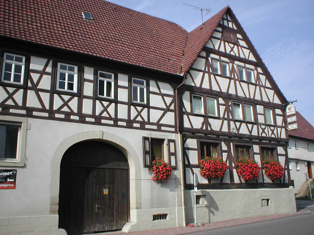 Historisches Gasthaus Löwen in Richen, erwähnt 1456, der heutige Bau datiert auf um 1575